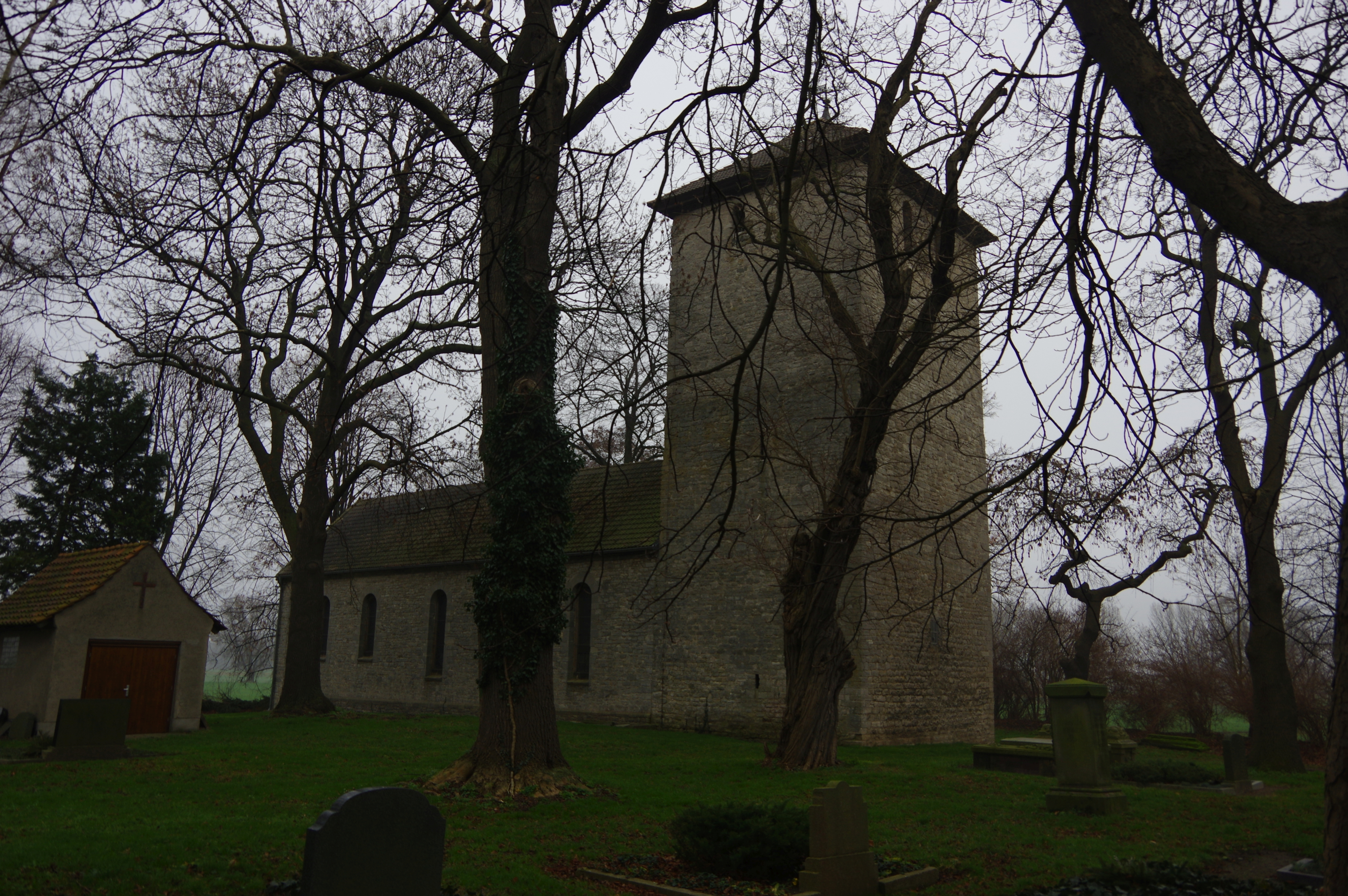 Groß Quenstedt in Sachsen-Anhalt. Das Gebäude (Adresse im Namen) steht unter Denkmalschutz.